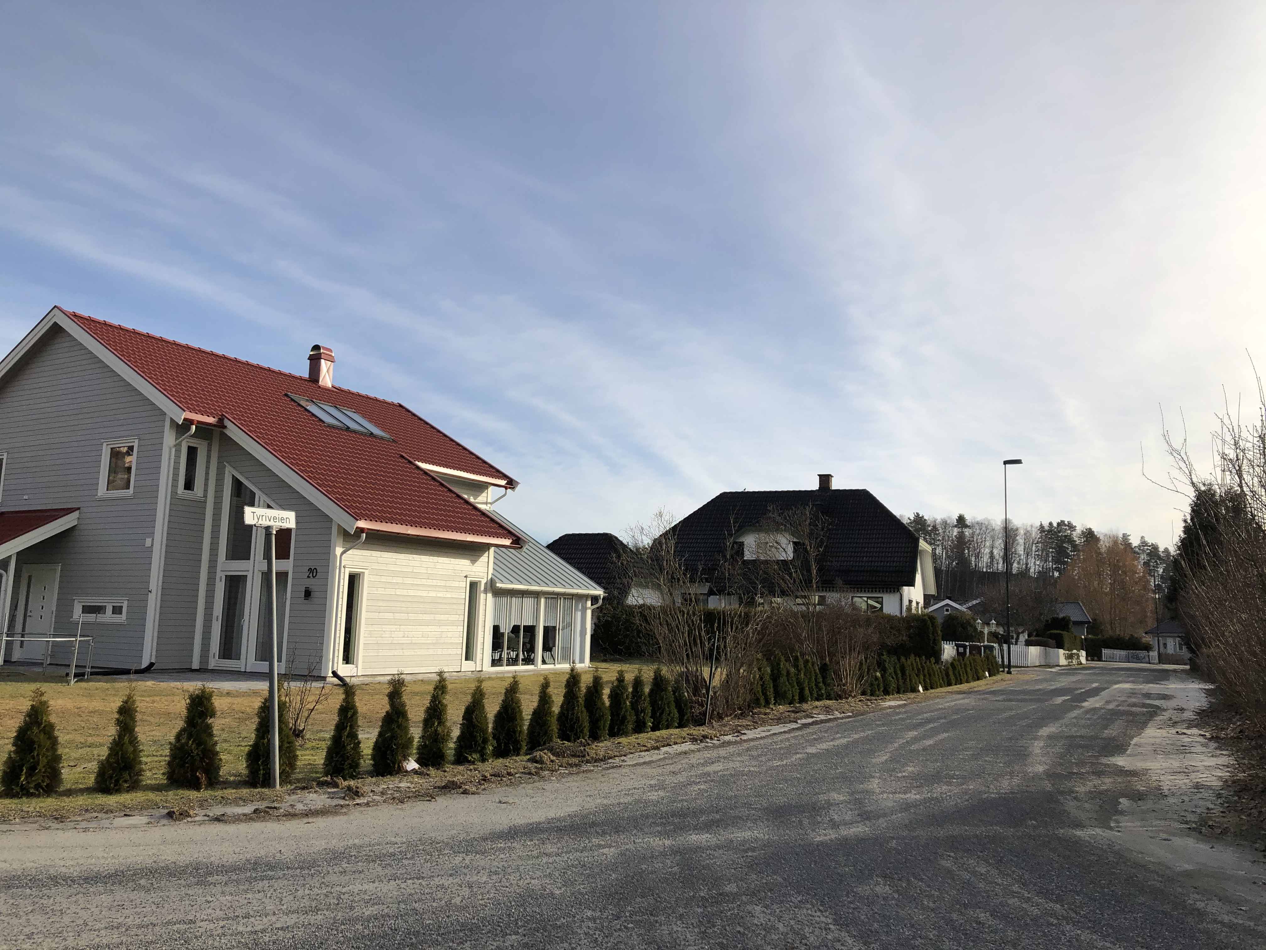 Tyriveien, sett fra Indre Løkkavei, Hønefoss